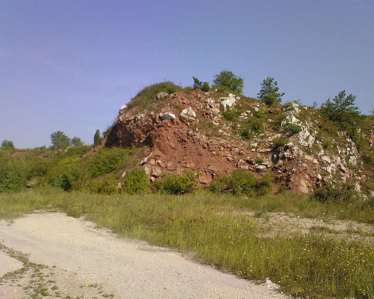 Jaworznia. Ostaniec skalny w dawnym kamieniołomie.